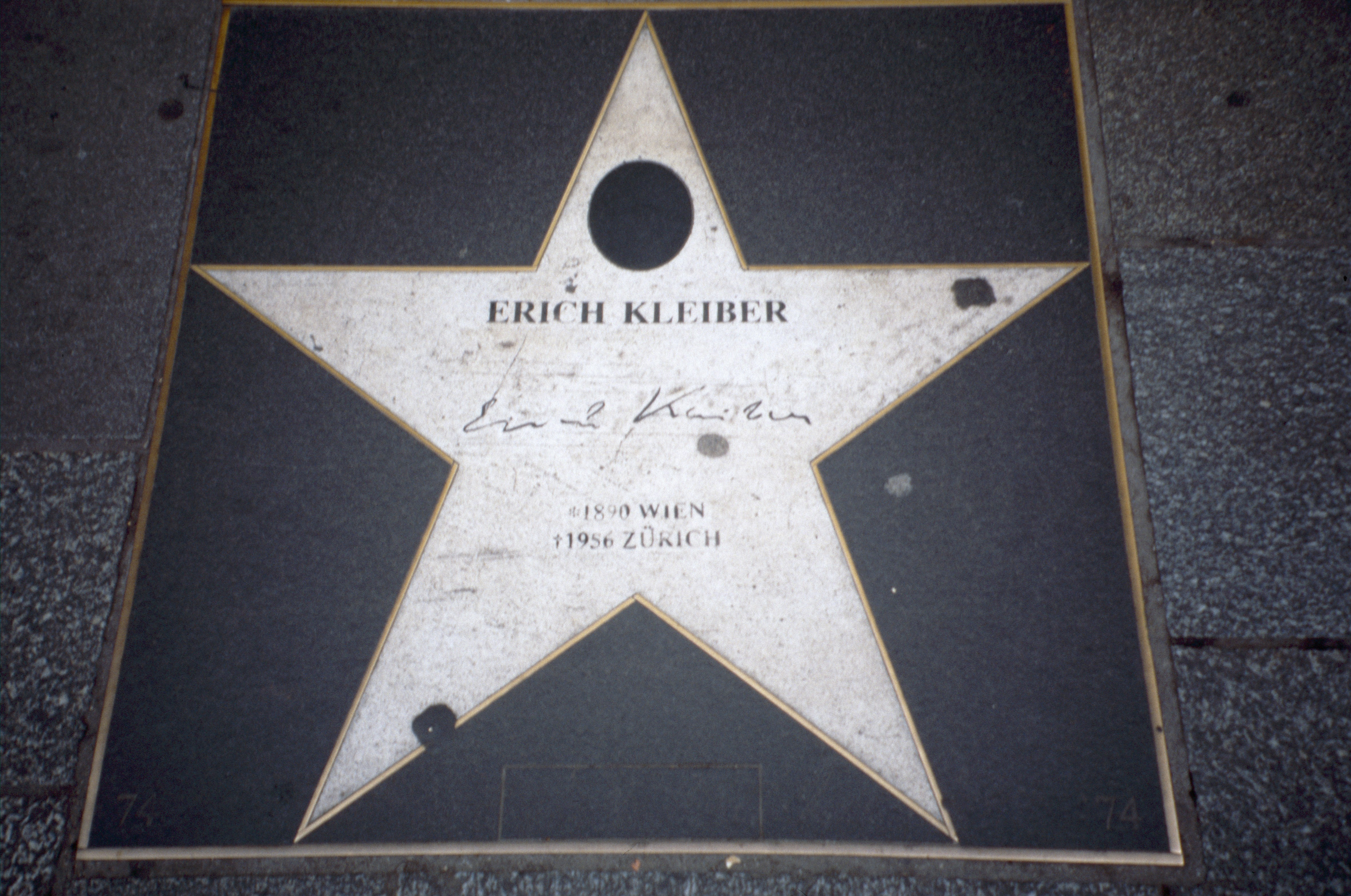 Bodengedenktafel für Erich Kleiber (1890-1956), österreichischer Dirigent; Wien, Kärntnerstraße